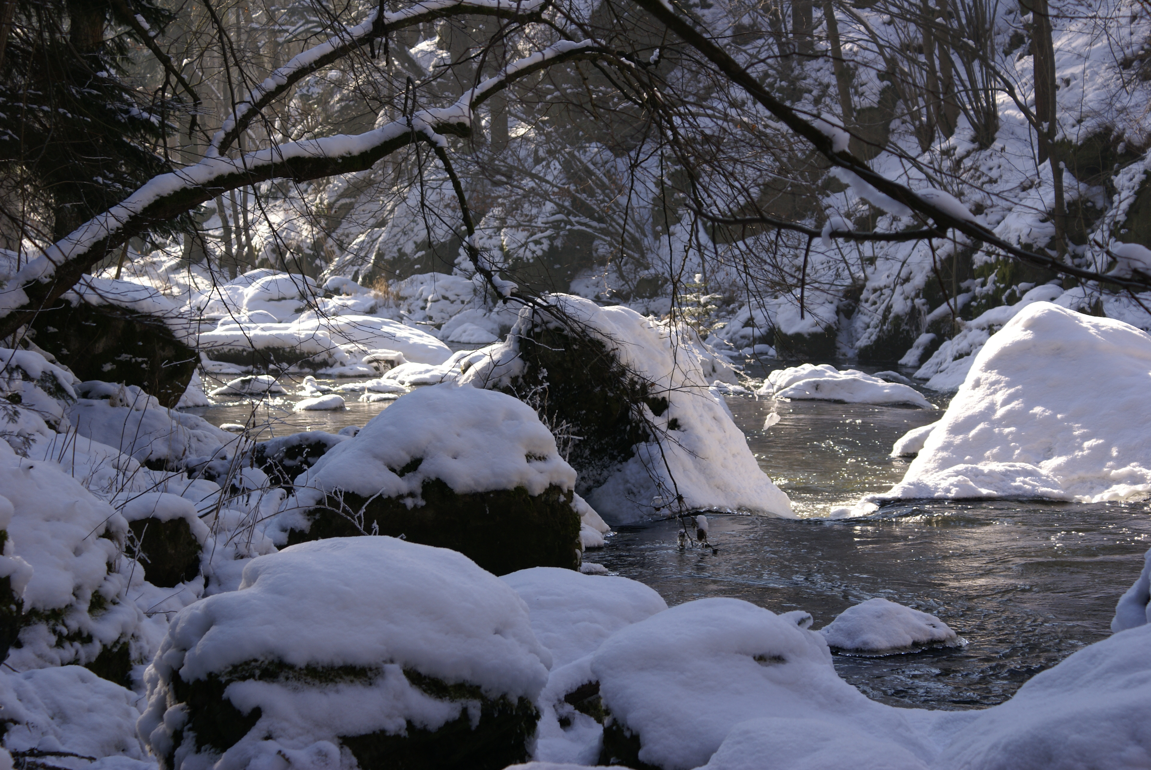 Naturschutzgebiet Triebtal (C35): Die Trieb hat sich ein tiefes Kerbtal geschaffen. Hier ist es auch im Sommer kühl und feucht. Das Bachbett ist mit großen Gesteinsblöcken angefüllt.